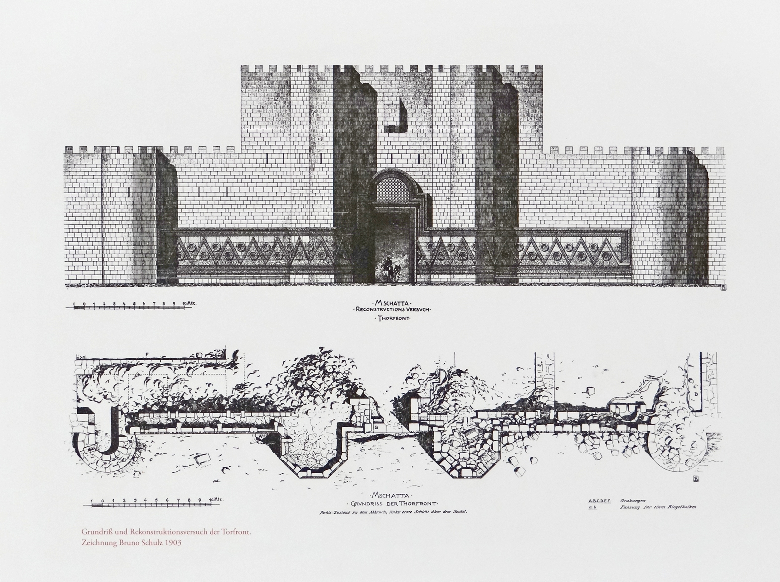 Reconstitution de l'entrée sud et de la façade du palais de Mchatta par Bruno Schulz en 1903 Le calife al-Walid II (743-744 après J.-C., dynastie Omeyyade) est à l'origine de la construction de ce palais d'hiver qui était situé dans le désert à 30 km au sud d'Amman, l'actuelle capitale de la Jordanie. Le matériau utilisé est le calcaire, les décors sculptés sont réalisés par blocs De grandes parties de la façade de ce palais inachevé en raison de la mort prématurée du calife ont été données par le sultan ottoman Abdoul Hamid II à l'empereur Guillaume II, qui en fit don aux Musées royaux de Berlin en 1903. Fiche sur le palais (site Découverte de l'art islamique par musée sans frontières) Dessin présenté dans le musée d'art islamique de Berlin / Museum für Islamische Kunst